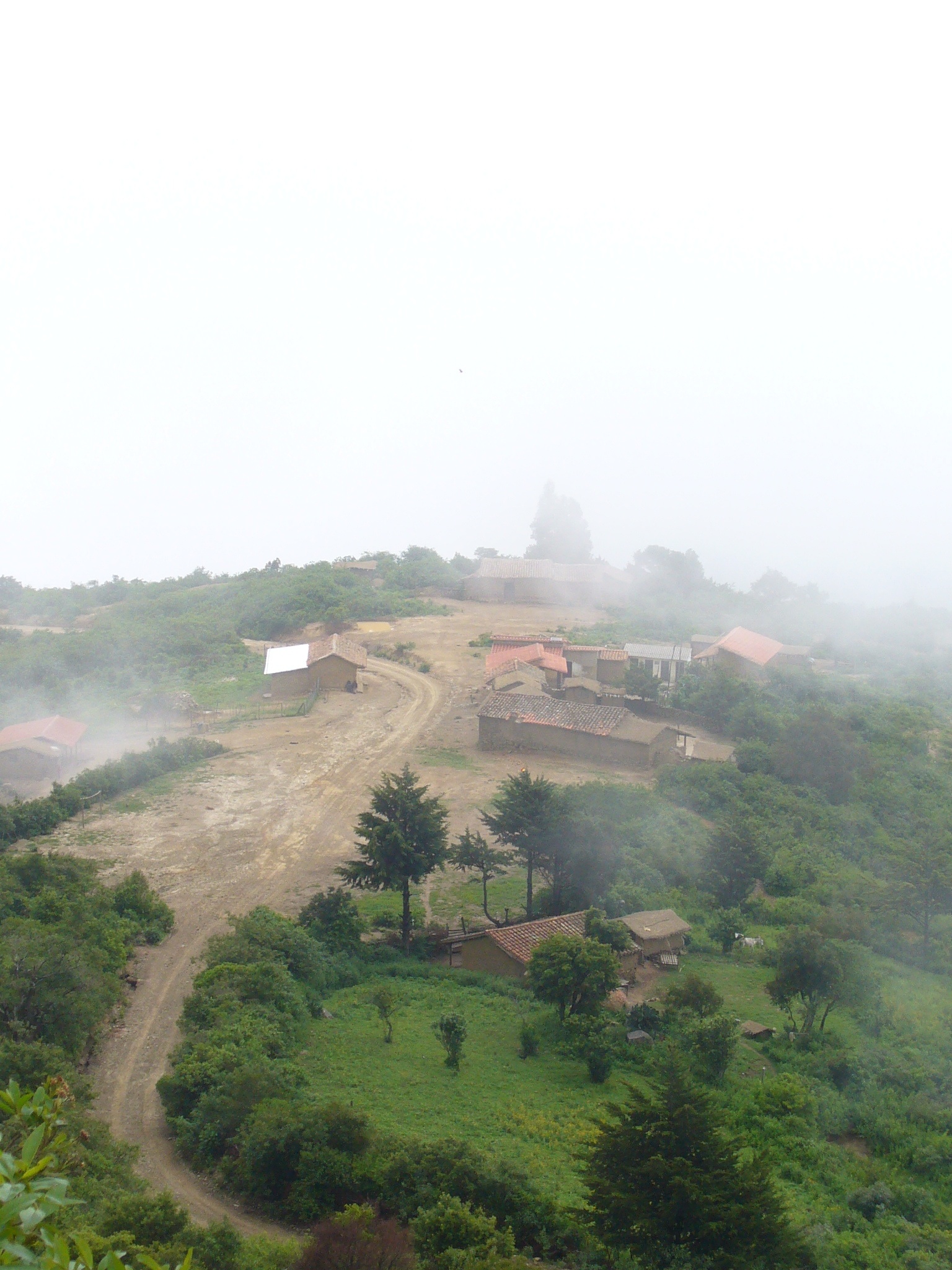 vista de la localidad de Abra del Picacho, situada en la provincia de Vallegrade del departamento de Santa Cruz, Bolivia.